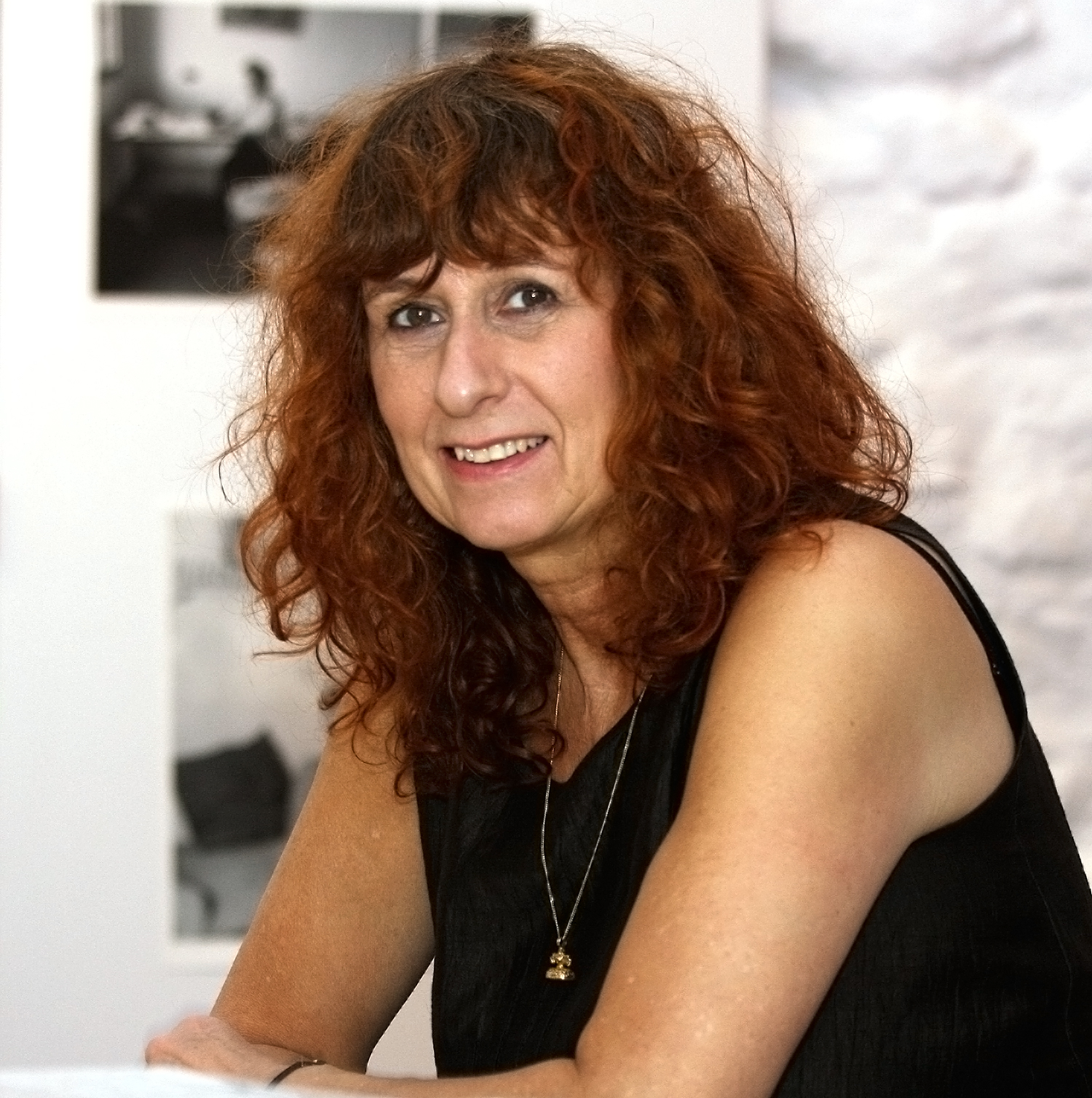 Franziska Becker, deutsche Cartoonistin, bei einer Signierstunde in Köln.